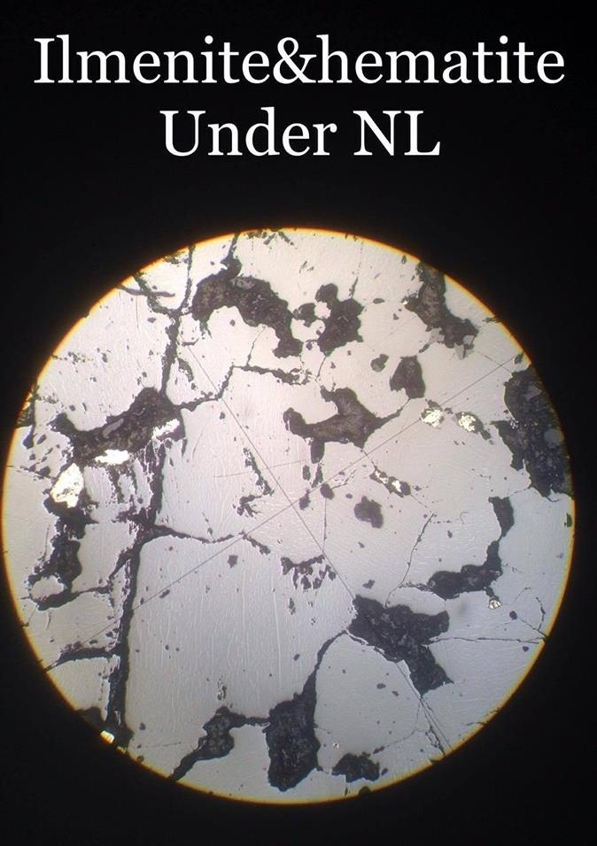 Microscopic image of Ilmenite and hematite under normal light